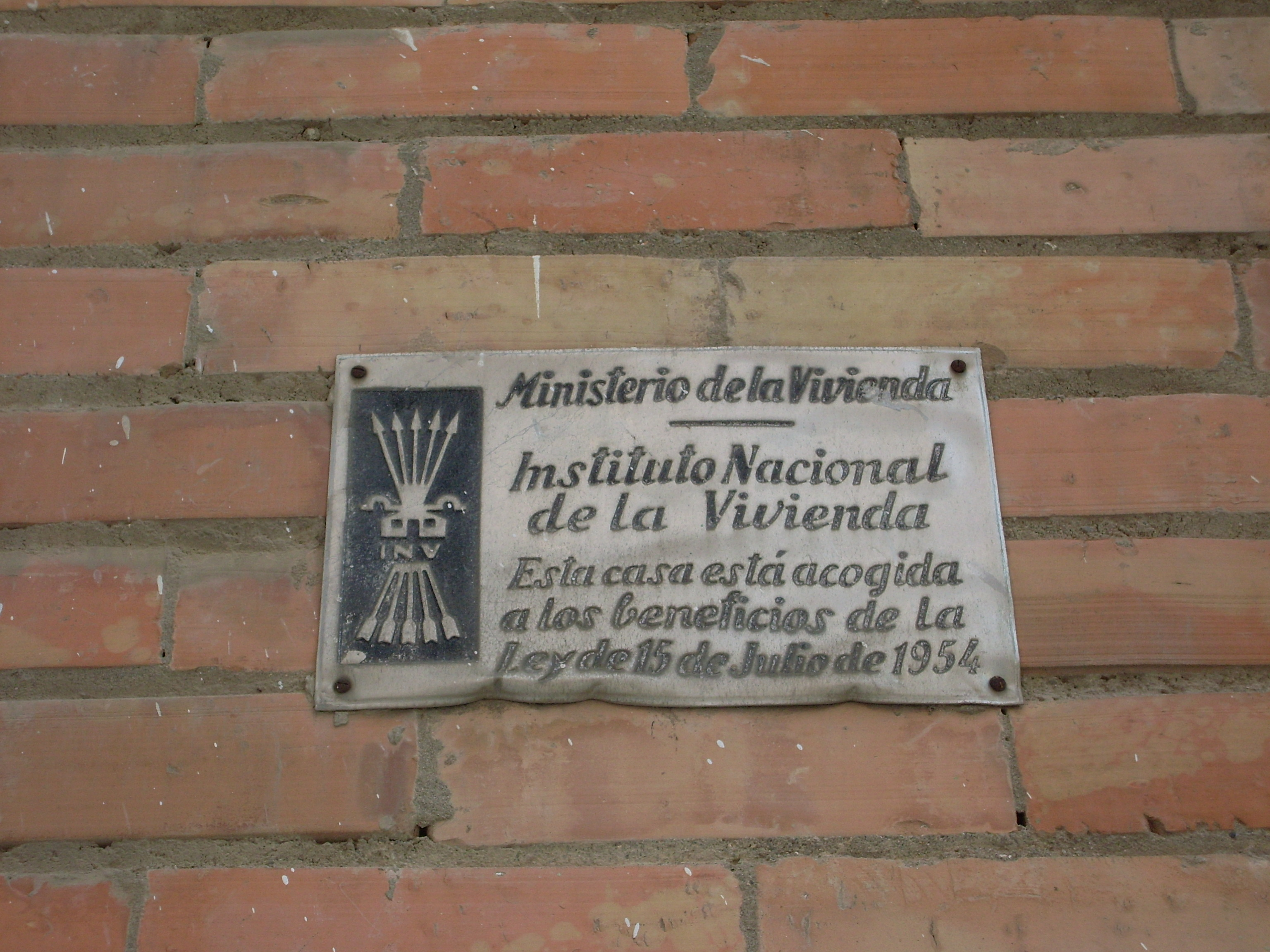 Placa del ministerio de la vivienda. Durante la época franquista se promocionó la construcción de casas baratas.